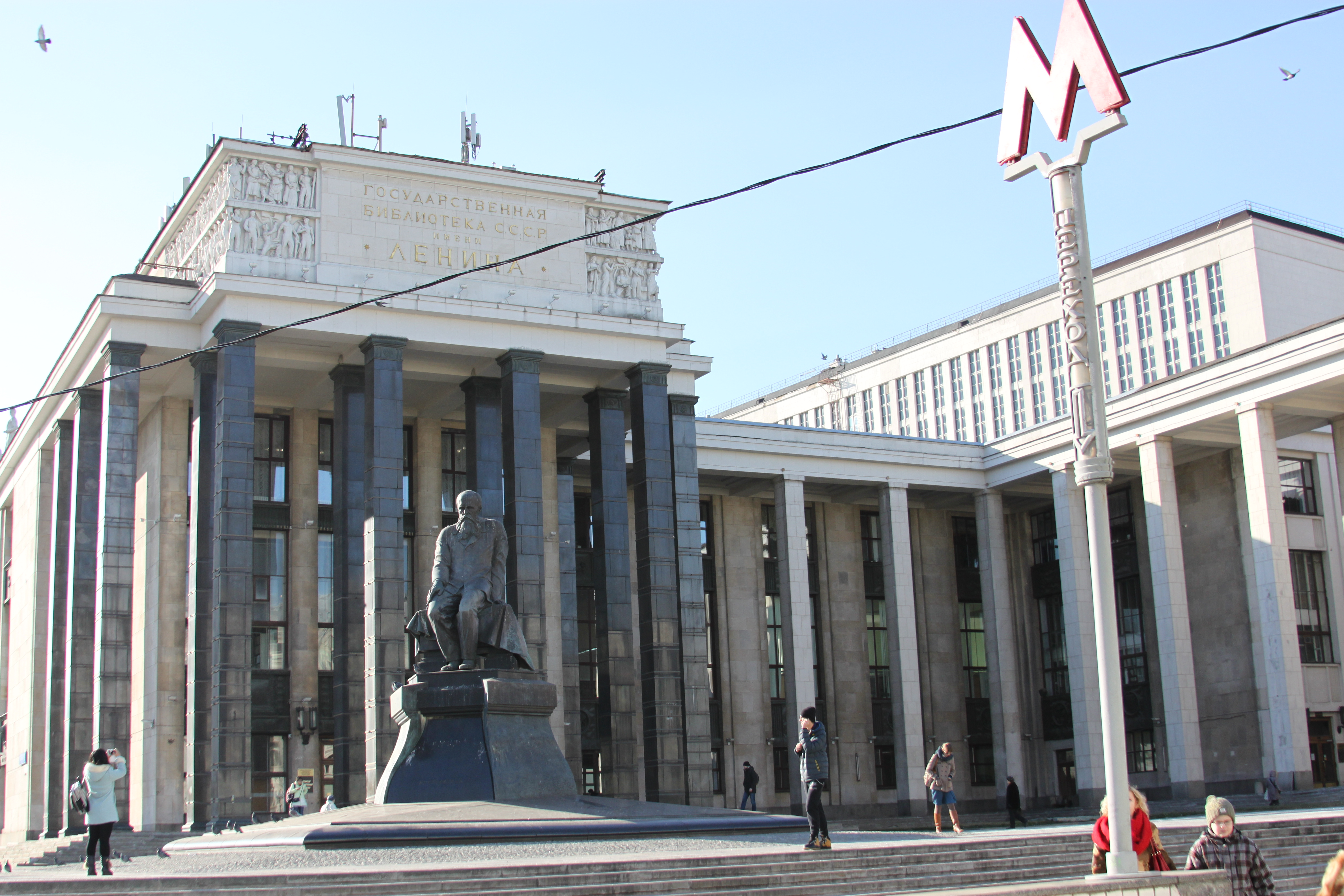 Москва. Российская государственная библиотека. «Ленинка» Государственная библиотека СССР им. В.И.Ленина2014 Moscow Russian State Library